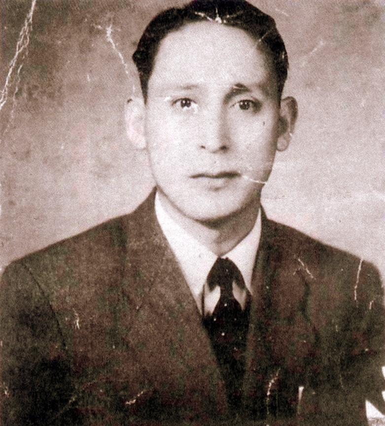 高一生照片